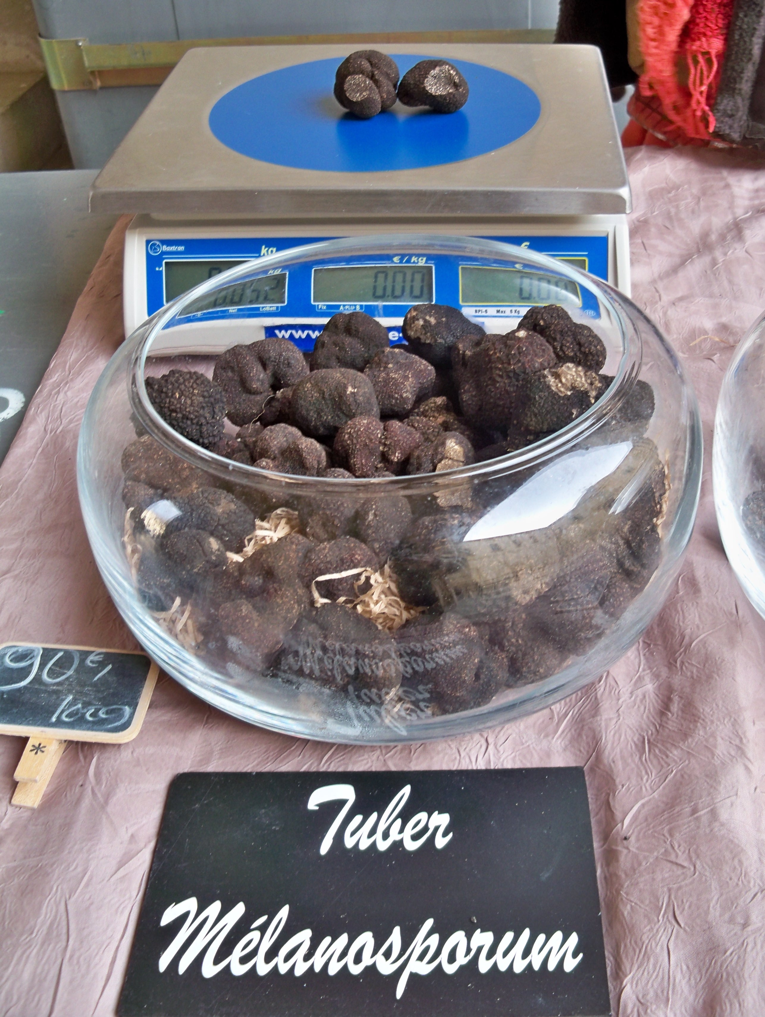 Détail de stand du marché hebdomadaire aux truffes, à Carpentras (84)